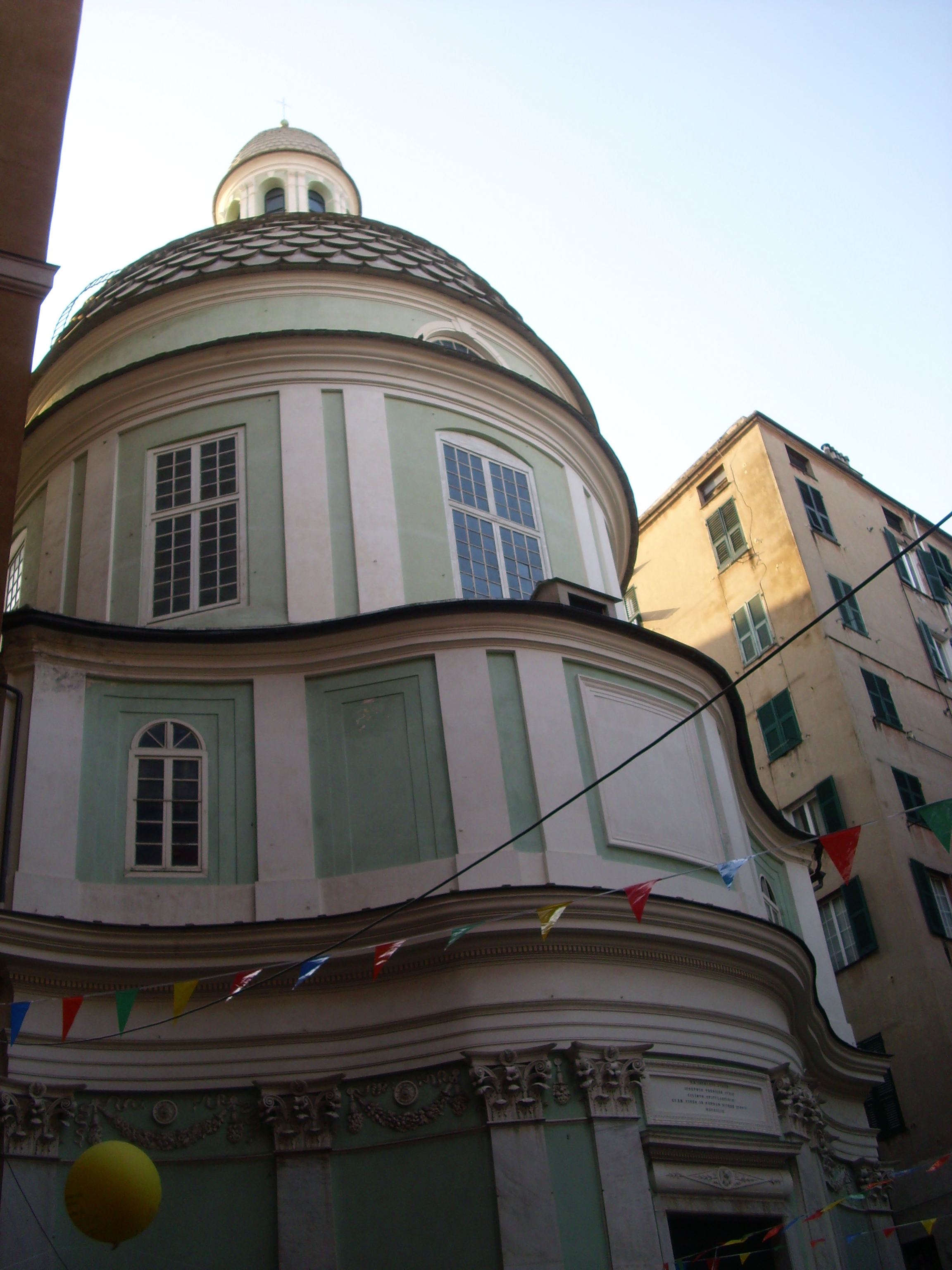 La chiesa di San Giorgio a Genova, nell'omonima piazza, particolare della facciata e della cupola.